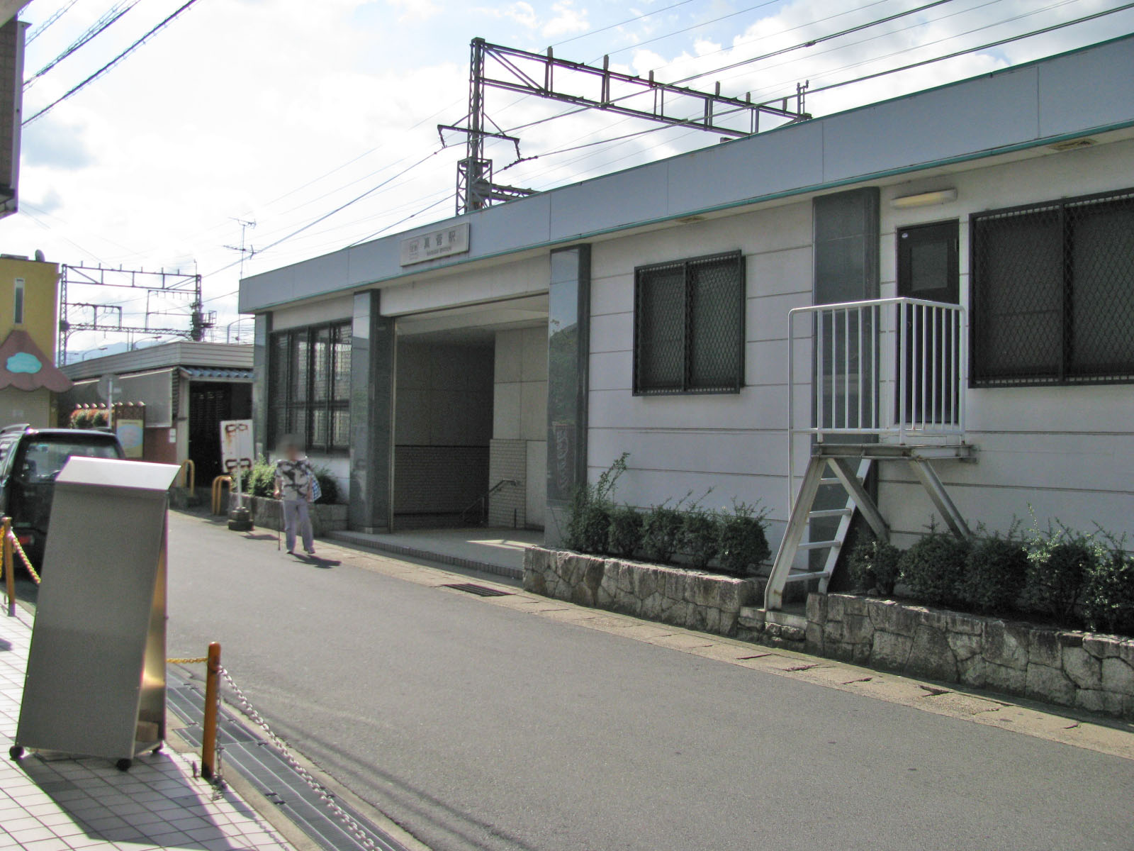 近鉄真菅駅